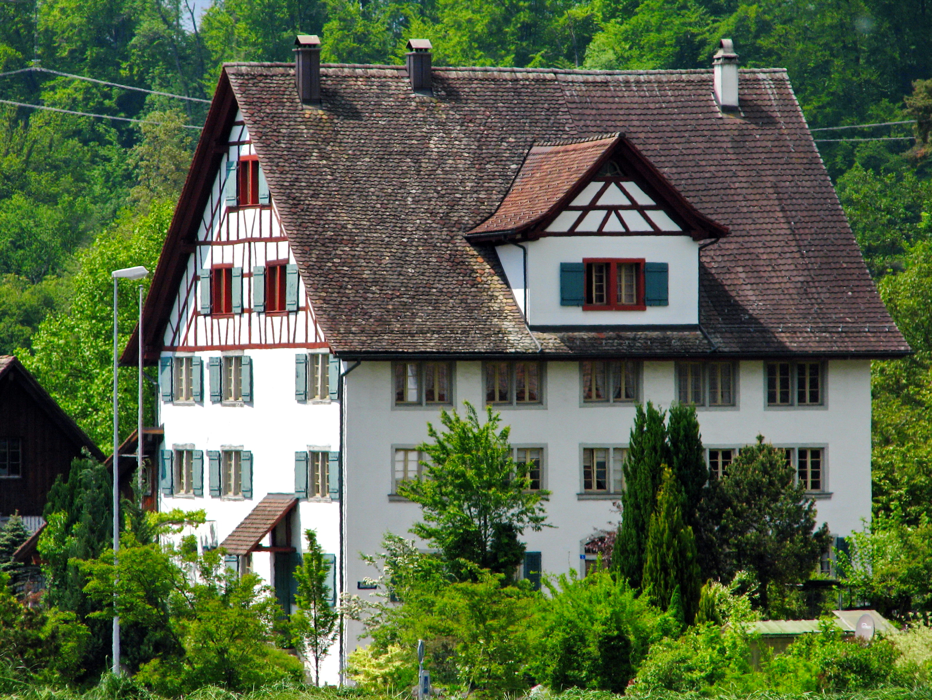 Hüllistein (hamlet) in Rüti (ZH)